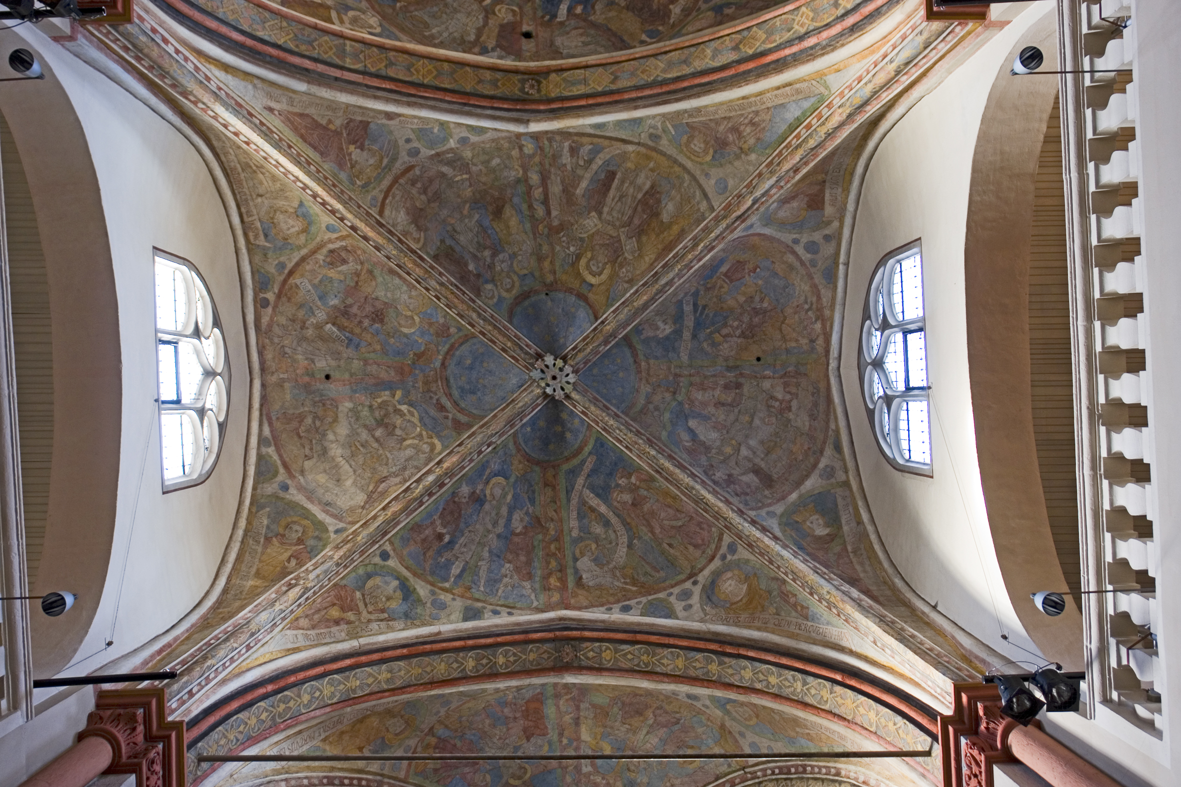 St. Maria Lyskirchen, Gewölbefresken im mittleren Hauptschiff